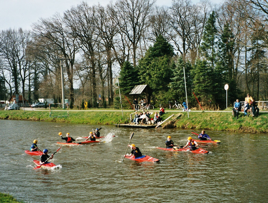 Kanupolo auf der Hase bei Quakenbrück